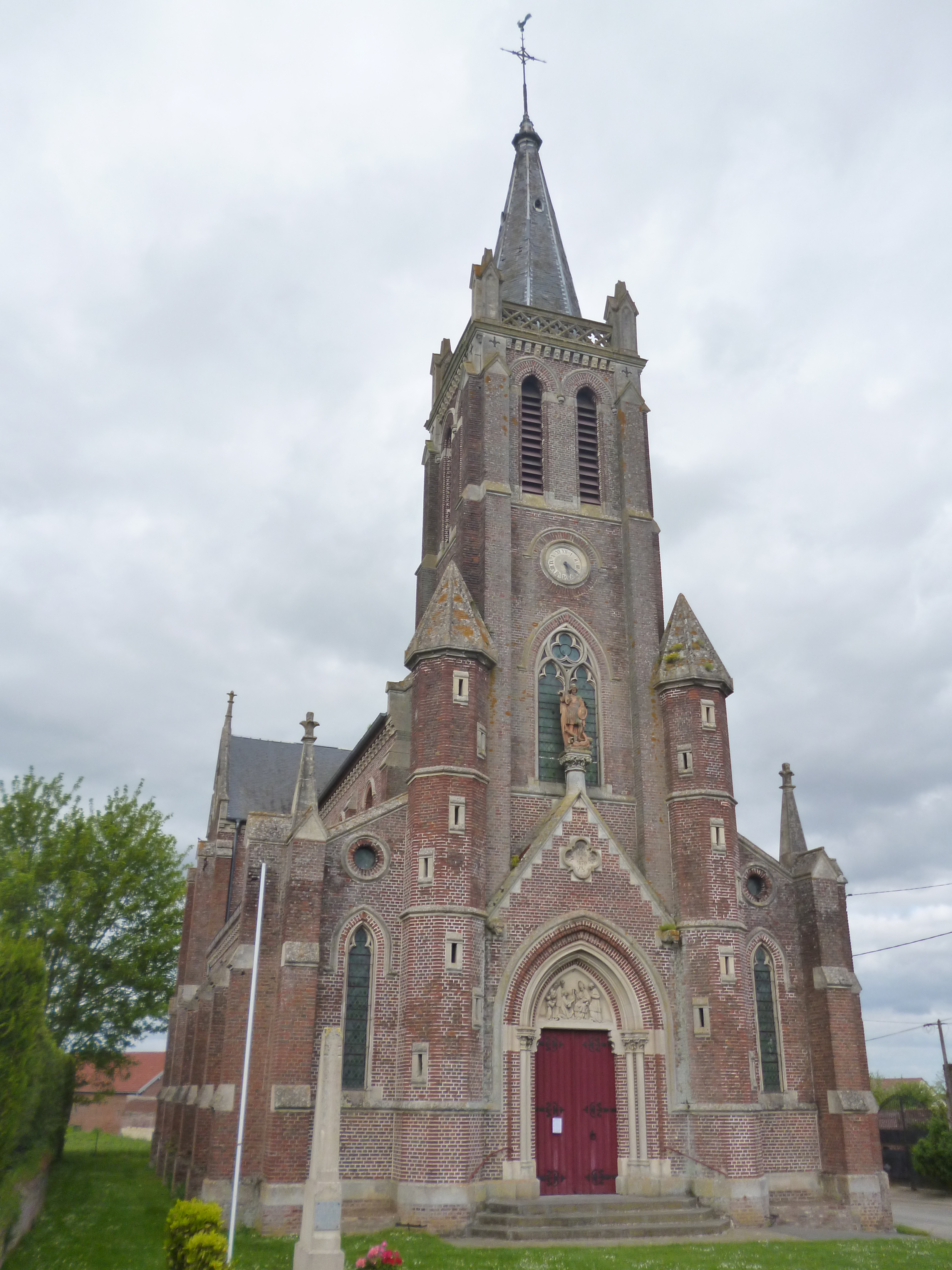 Eglise Saint-Victor de Plainville (Oise).